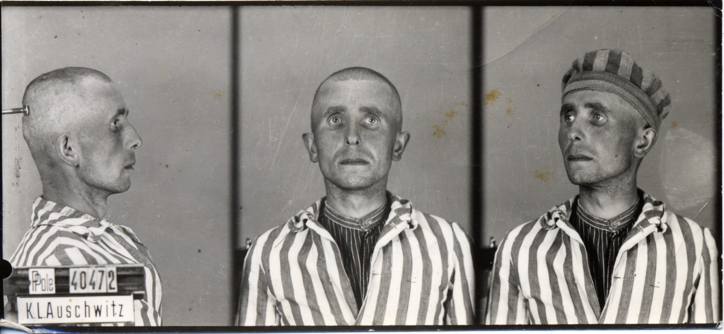 Michał Liborski - jeniec nr 40472 obozu K.L. Auschwitz